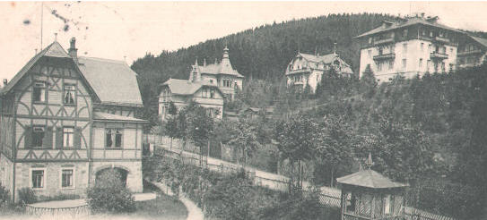 Villen in Kipsdorf, Emmenklause, Villa Waldwinkel, Villa Susanna und Oberlausitzer Haus; Ansichtskarte Nr. 107